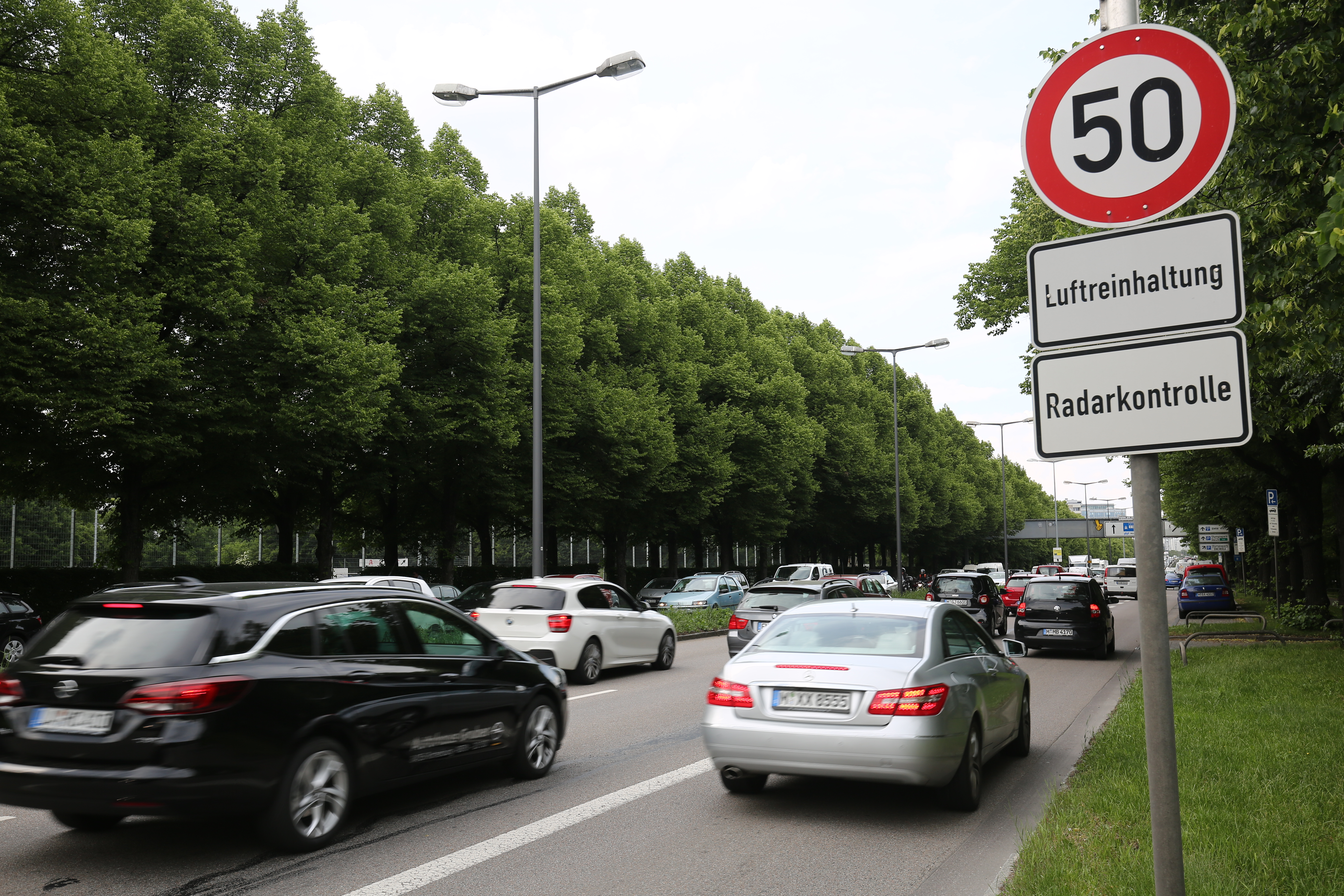 Geschwindigkeitsbegrenzung wegen Luftreinhaltung, Dieselgate, Munich, München, Landshuter Allee